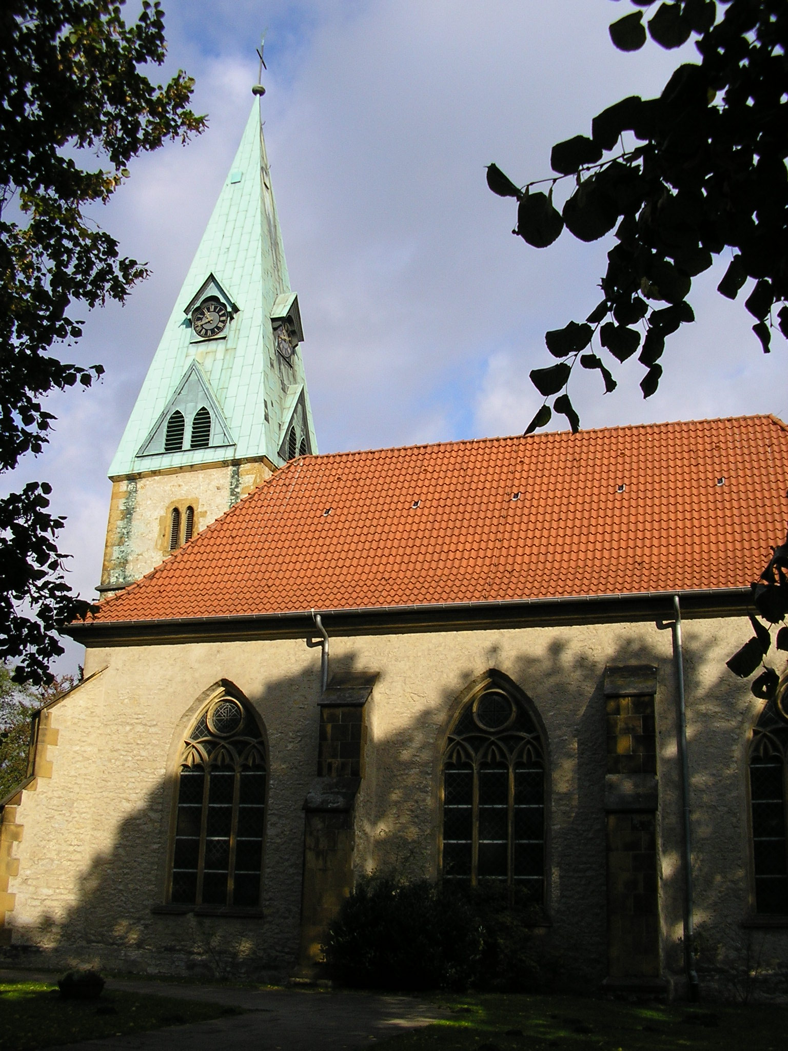 evang.-luth. Pfarrkirche St. Peter und Paul Bielefeld-Heepen